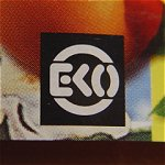 Foto pot jam met EKO keurmerk. Op verzoek Andre Engels de melding dat dit een eigen foto betreft. Roel 9 mei 2004 12:25 (CEST)